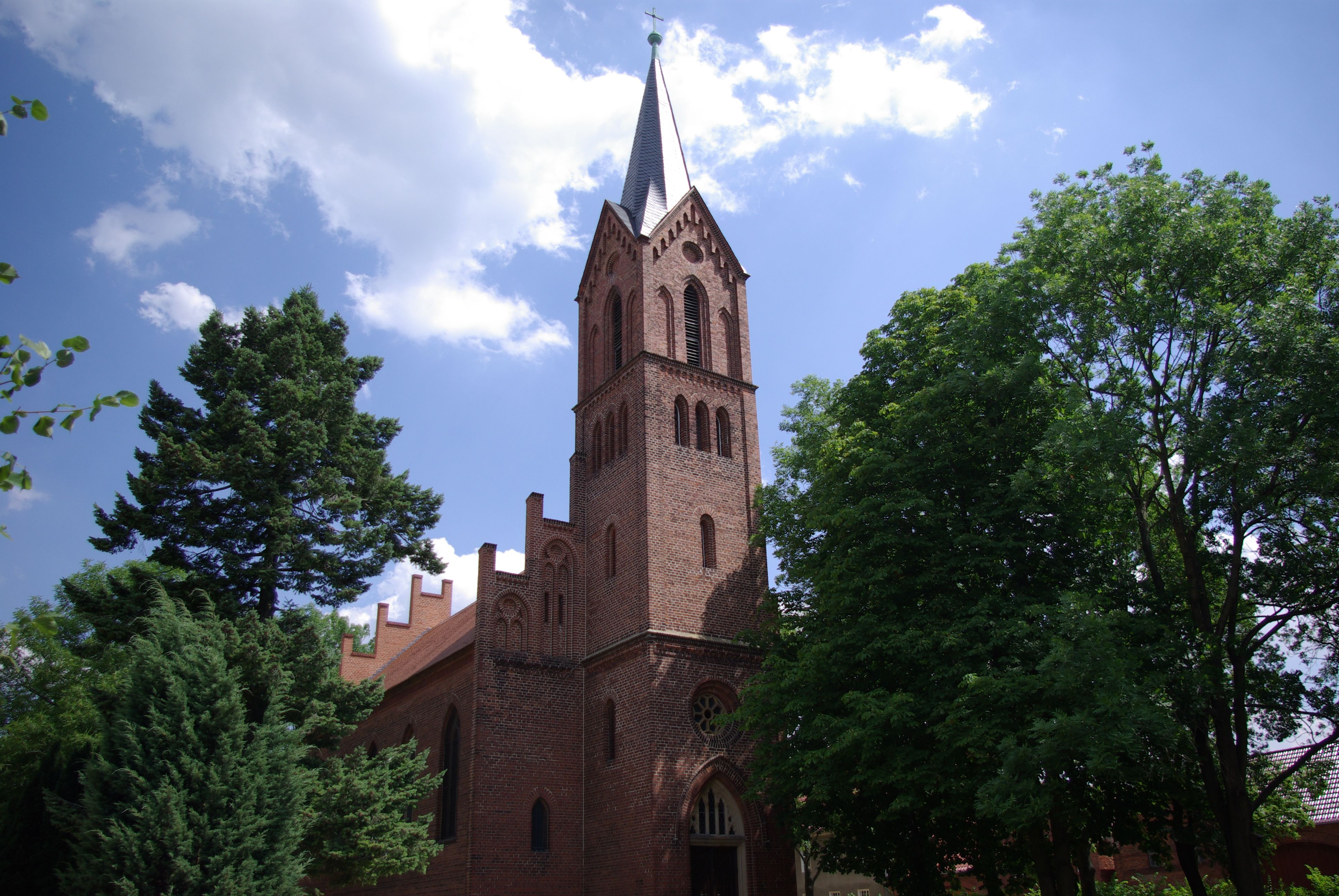 Jüterbog Ortsteil Grüna in Brandenburg. Die gegenüber der Gemeindeverwaltung befindliche Kirche steht unter Denkmalschutz.